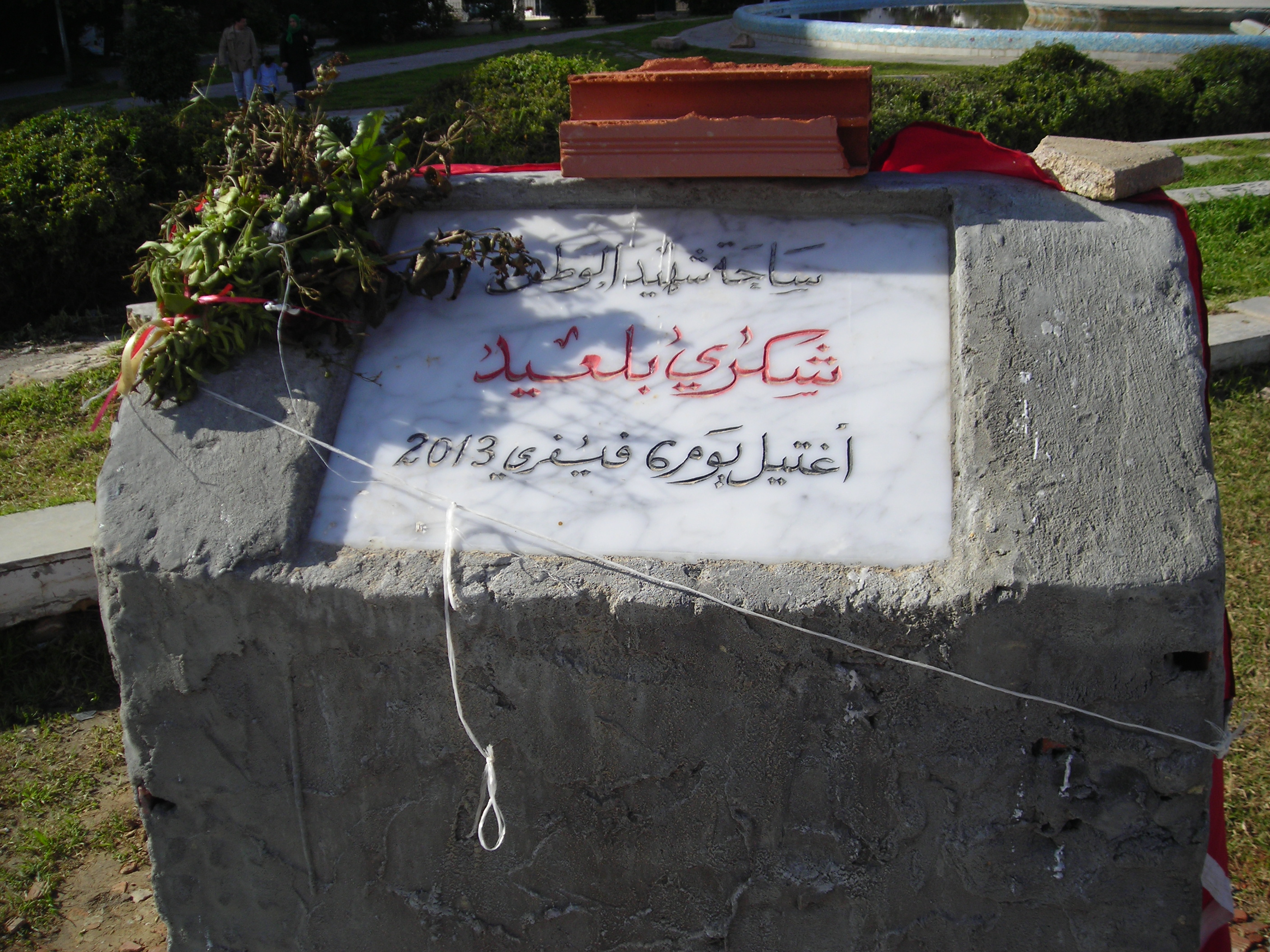 Place Chokri Belaid